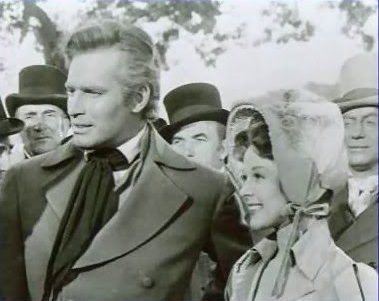 「真紅の女」の宣材用写真